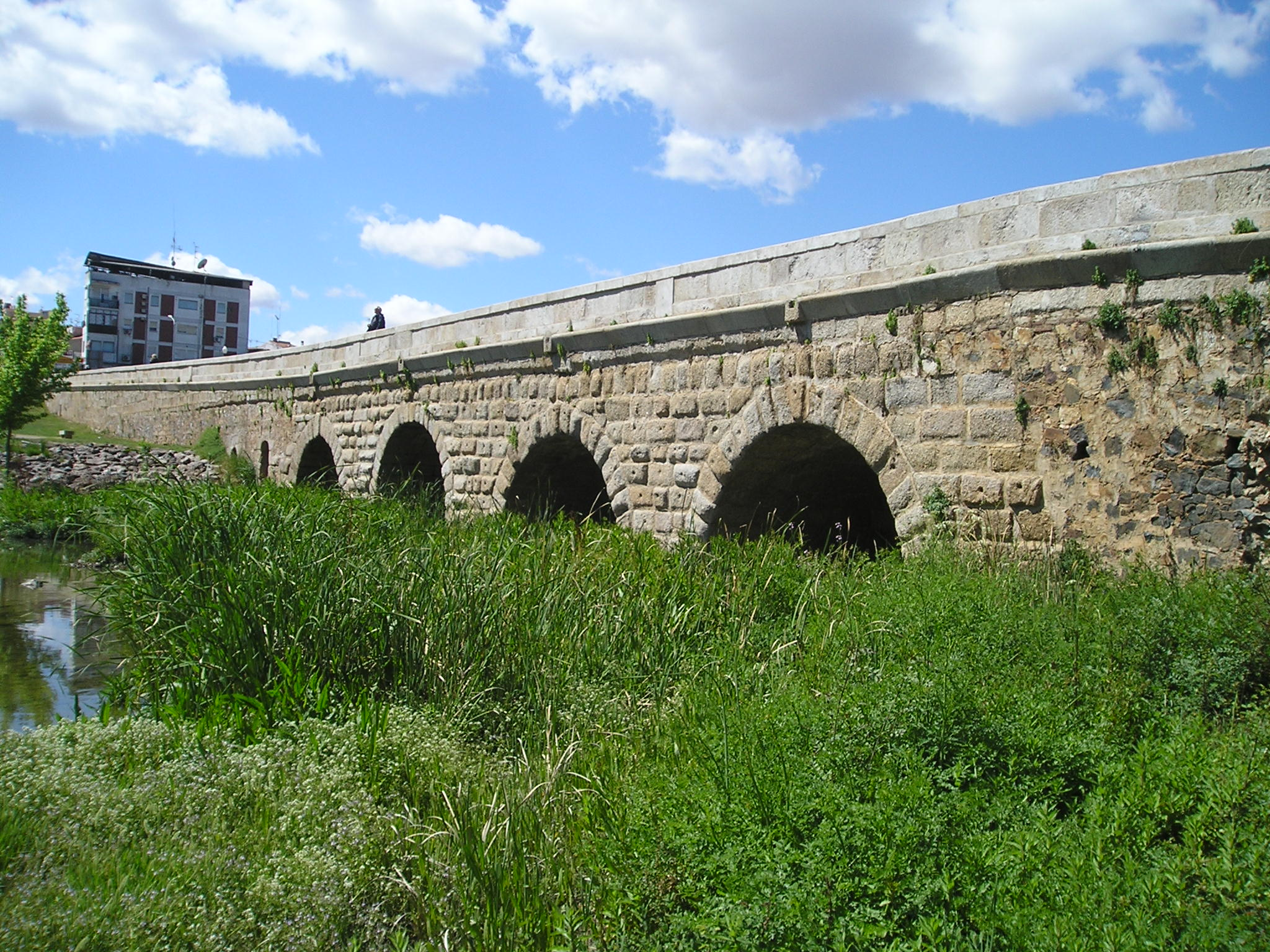 Puente romano sobre el Río Albarregas en Mérida (Badajoz, España); vista desde la orilla izquierda hacia la ciudad